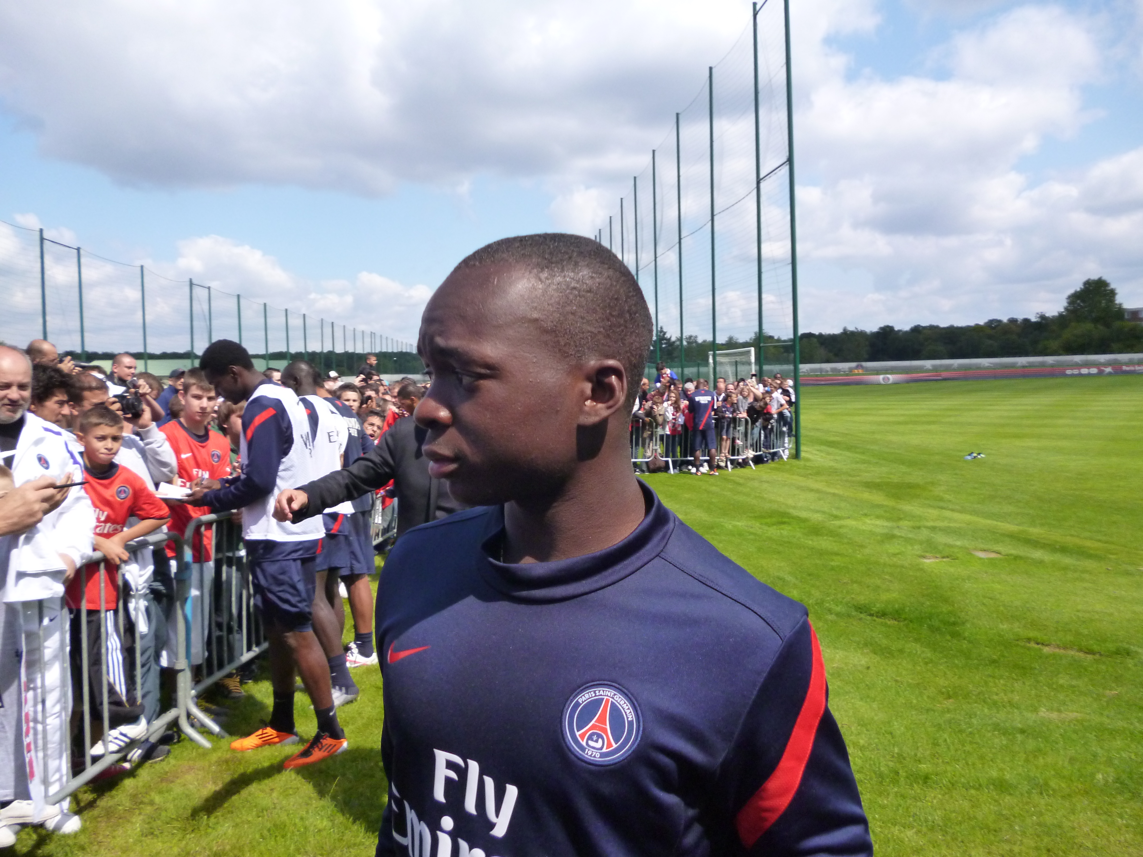 Neeskens Kebano au Camp des Loges le 24 juillet 2011. Photo Vincent Hanquet pour